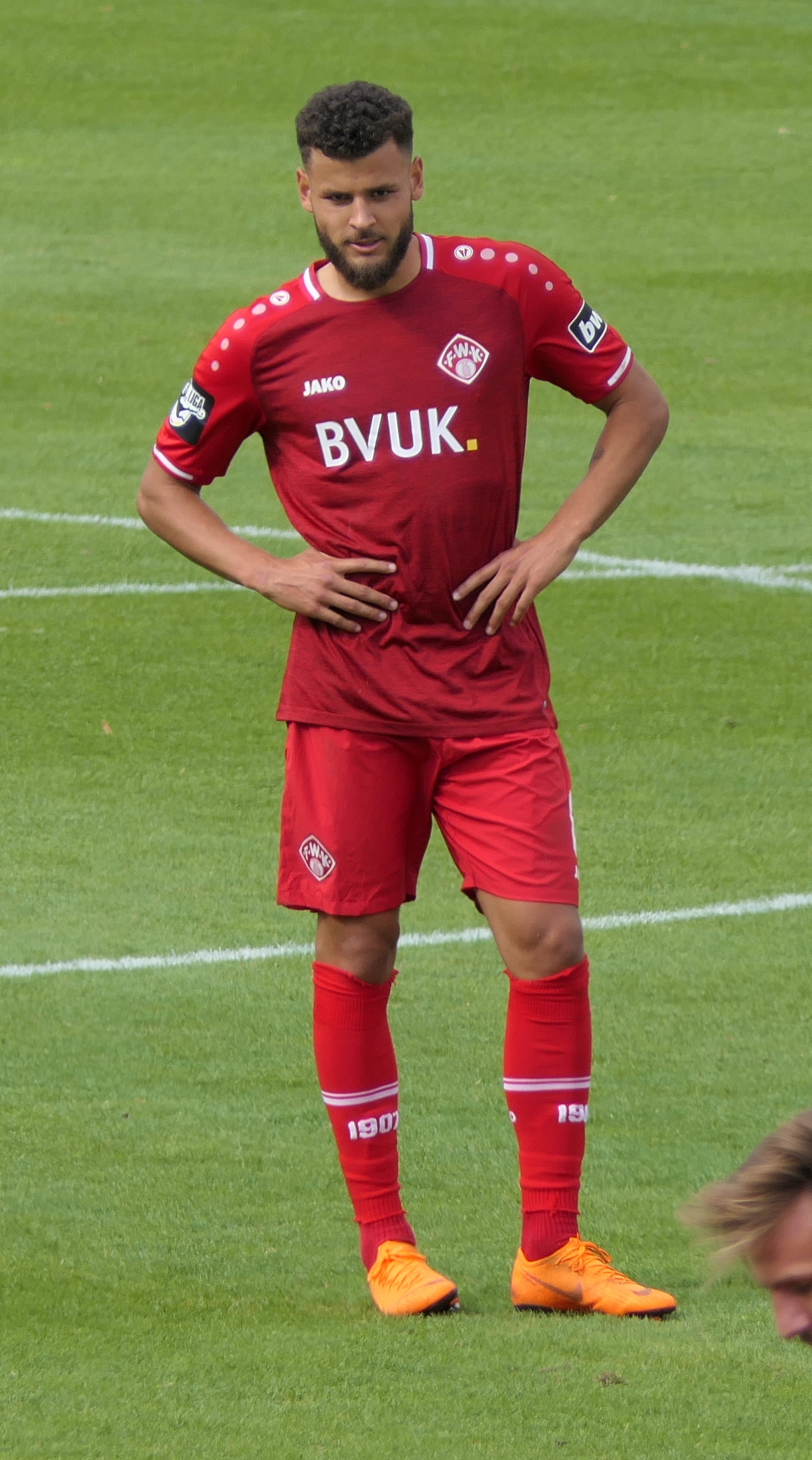 Der Fussballprofi David Gnaase im Trikot der Würzburger Kickers beim Heimspiel gegen Eintracht Braunschweig am 22.09.2018.